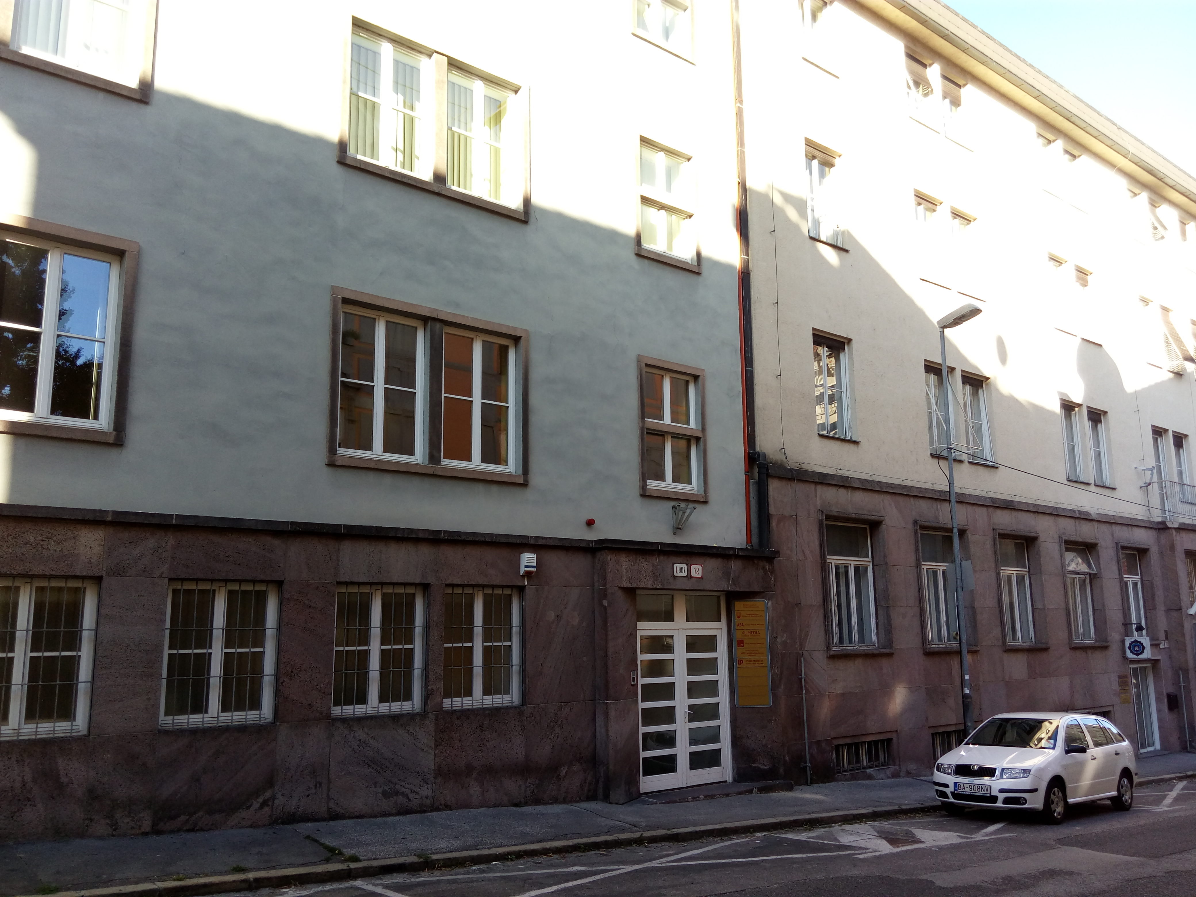 Gunduličova 12, Staré Mesto, Bratislava